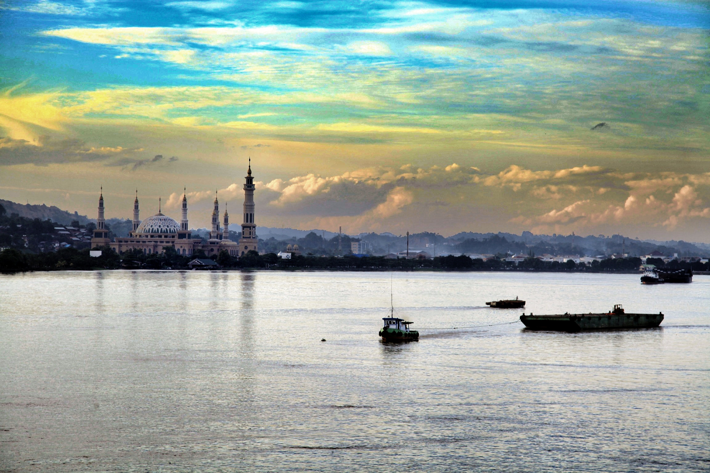 Mahakam merupakan nama sebuah sungai terbesar di provinsi Kalimantan Timur yang bermuara di Selat Makassar. Sungai dengan panjang sekitar 920 km ini melintasi wilayah Kabupaten Kutai Barat di bagian hulu, hingga Kabupaten Kutai Kartanegara dan Kota Samarinda di bagian hilir. Di sungai hidup spesies mamalia ikan air tawar yang terancam punah, yakni Pesut Mahakam. Sungai Mahakam sejak dulu hingga saat ini memiliki peranan penting dalam kehidupan masyarakat di sekitarnya sebagai sumber air, potensi perikanan maupun sebagai prasarana transportasi.